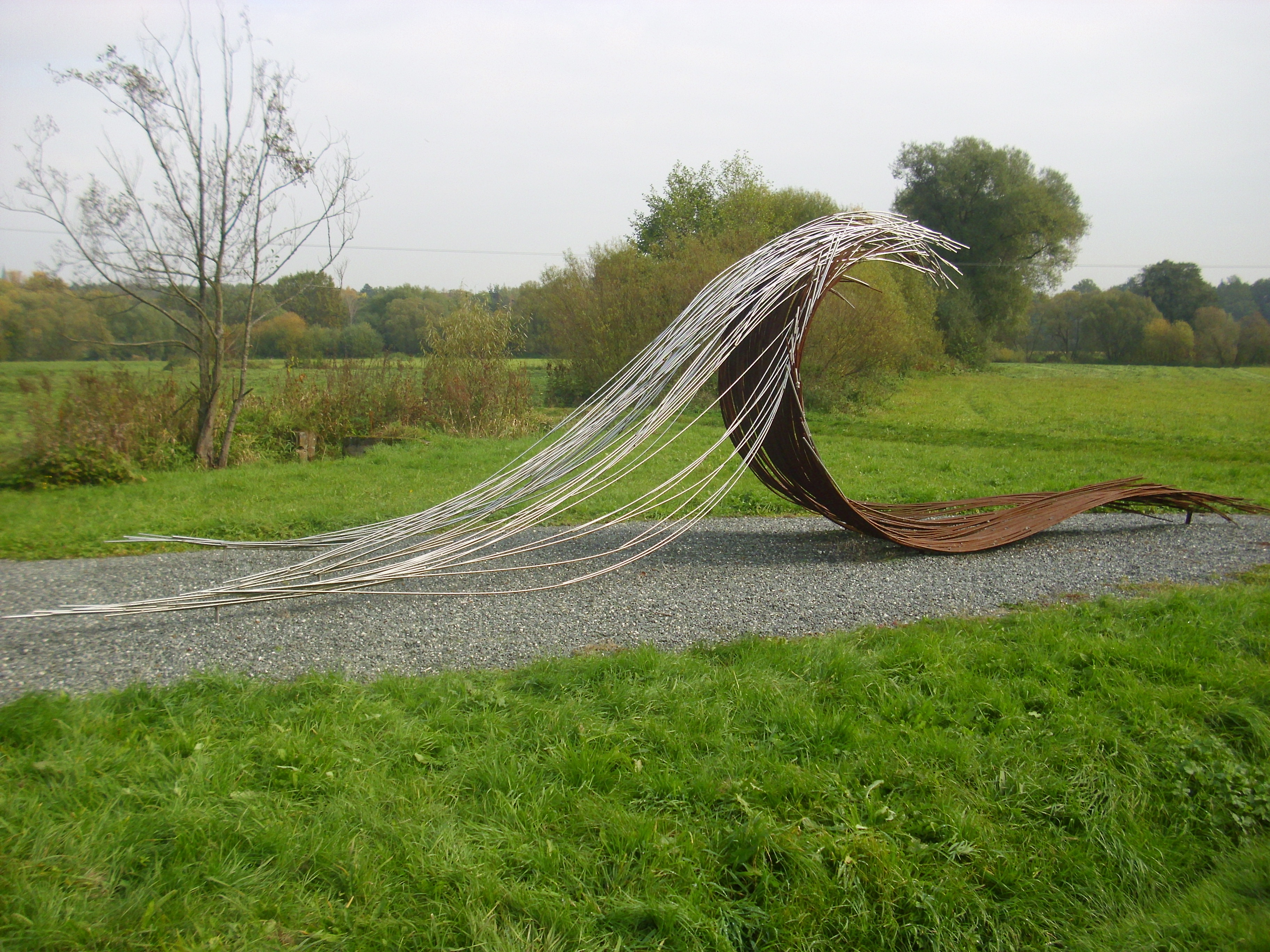 „Die Welle“ von Sabine Mädl aus Ursensollen als Teil des Rednitzhembacher Kunstweges